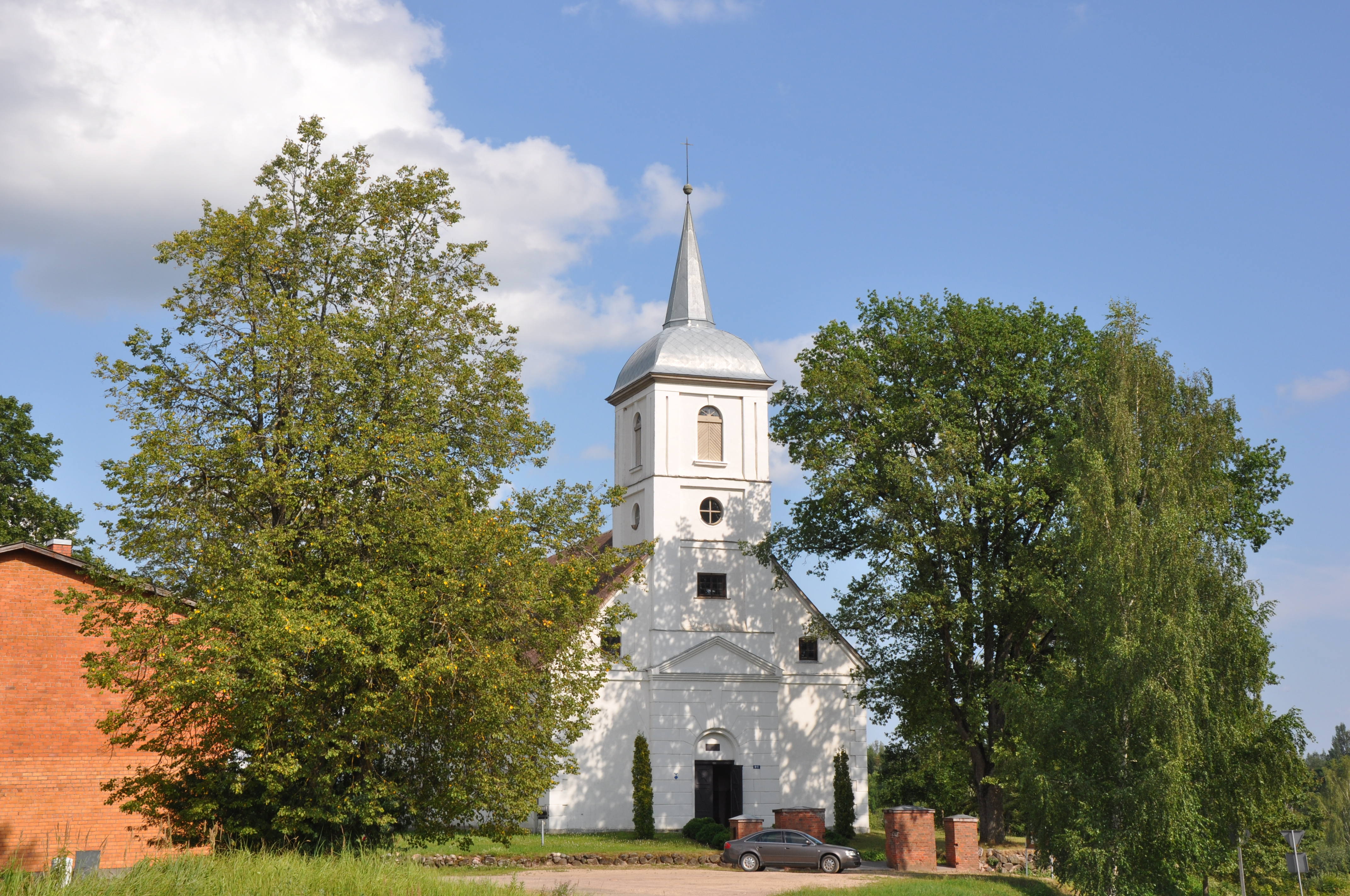 Lazdonas evaņģēliski luteriskā baznīca, Madona, Latvia